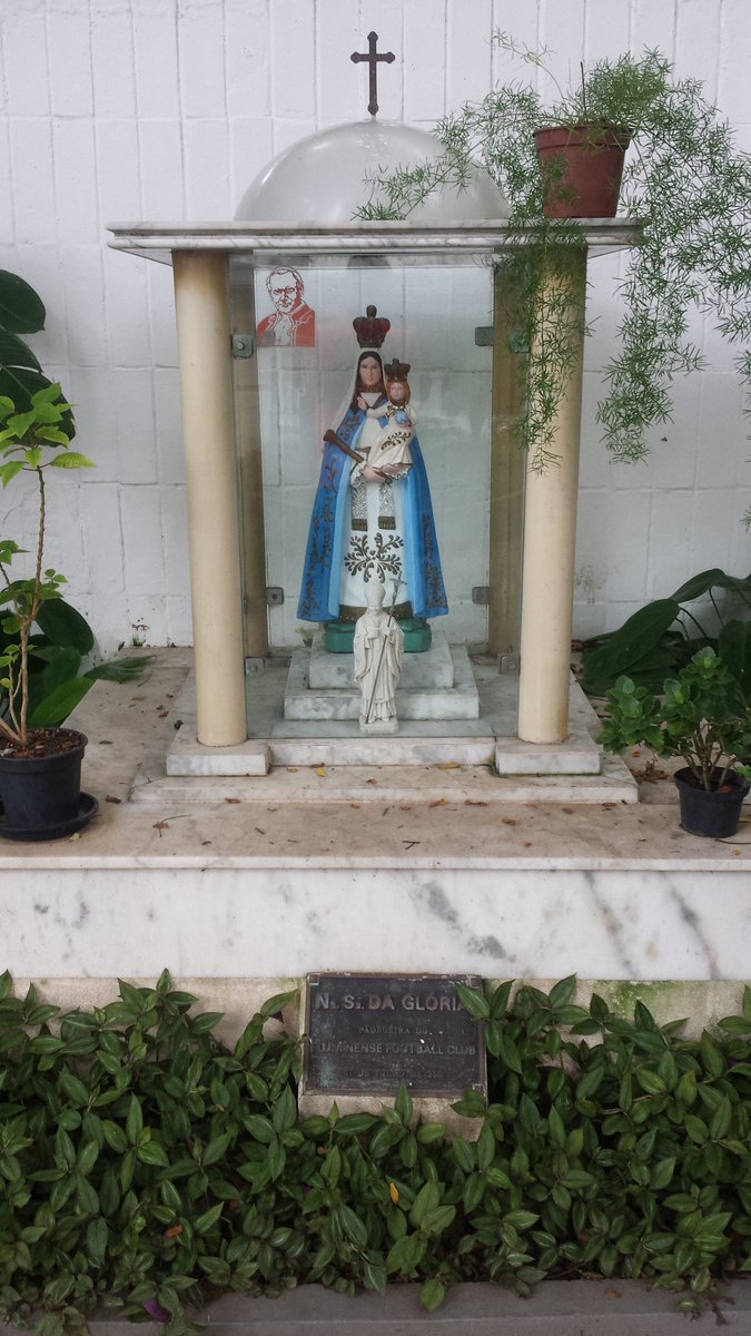 Imagem de Nossa Senhora da Glória no Fluminense Football Club.